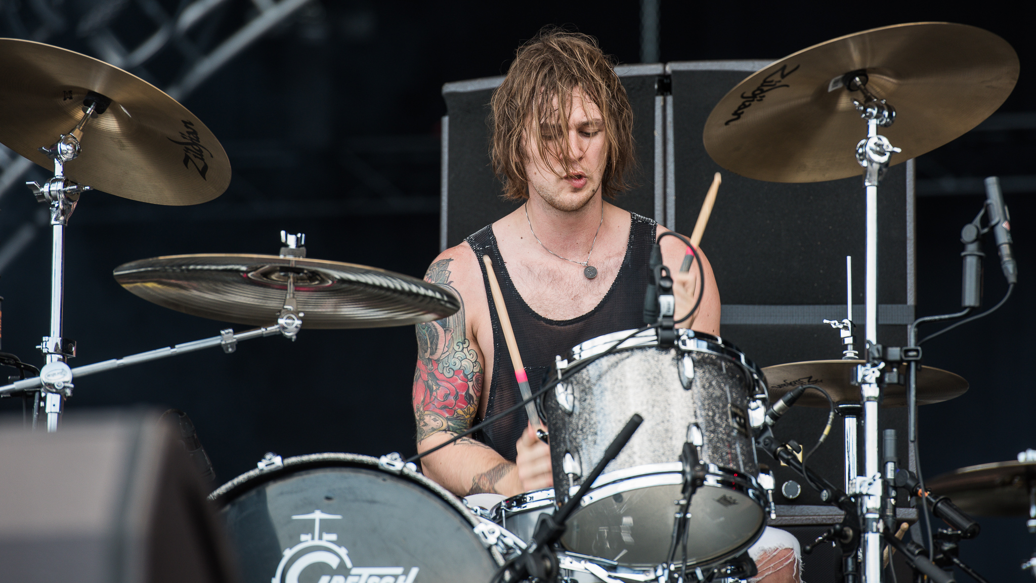 ARGO-Konzerte,Festival,Gethin Davies,Konzert,Livekonzert,Livemusik,Musik,RiP,Rock im Park 2016,Seat Zeppelin Stage,The Struts